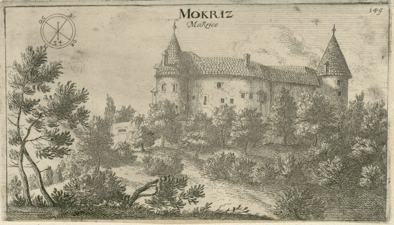 Grad Mokrice